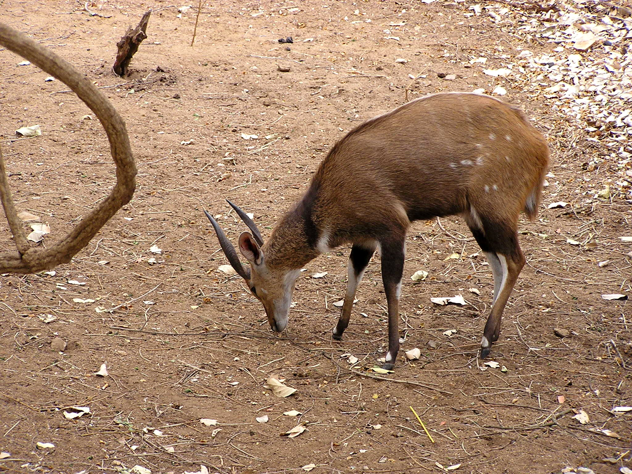 Male Bushbuck, Krüger National Park, Südafrika